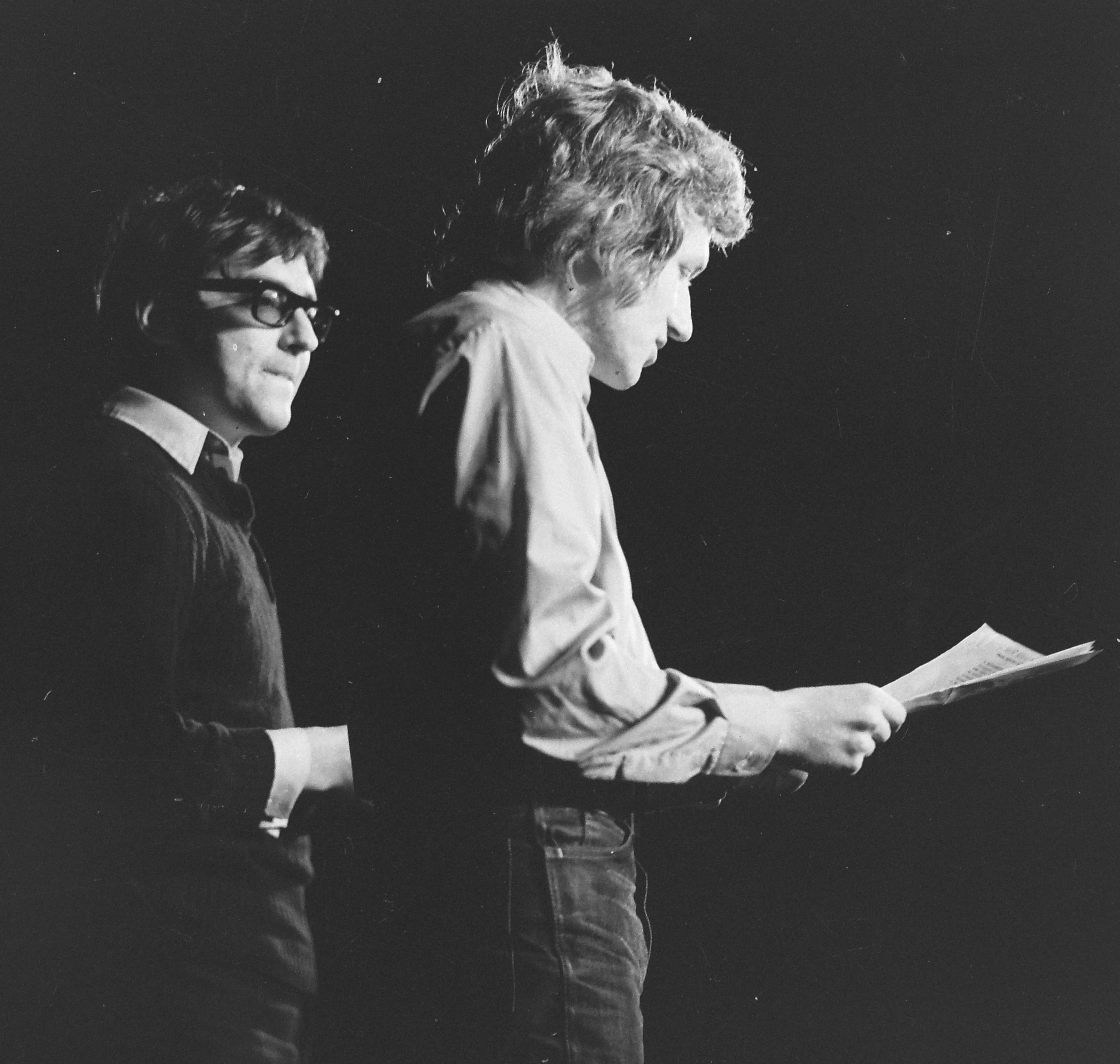 Verebes István és Kern András színművészek. Location: Hungary, Budapest V. Tags: celebrity, actor, Budapest Title: Verebes István és Kern András színművészek.